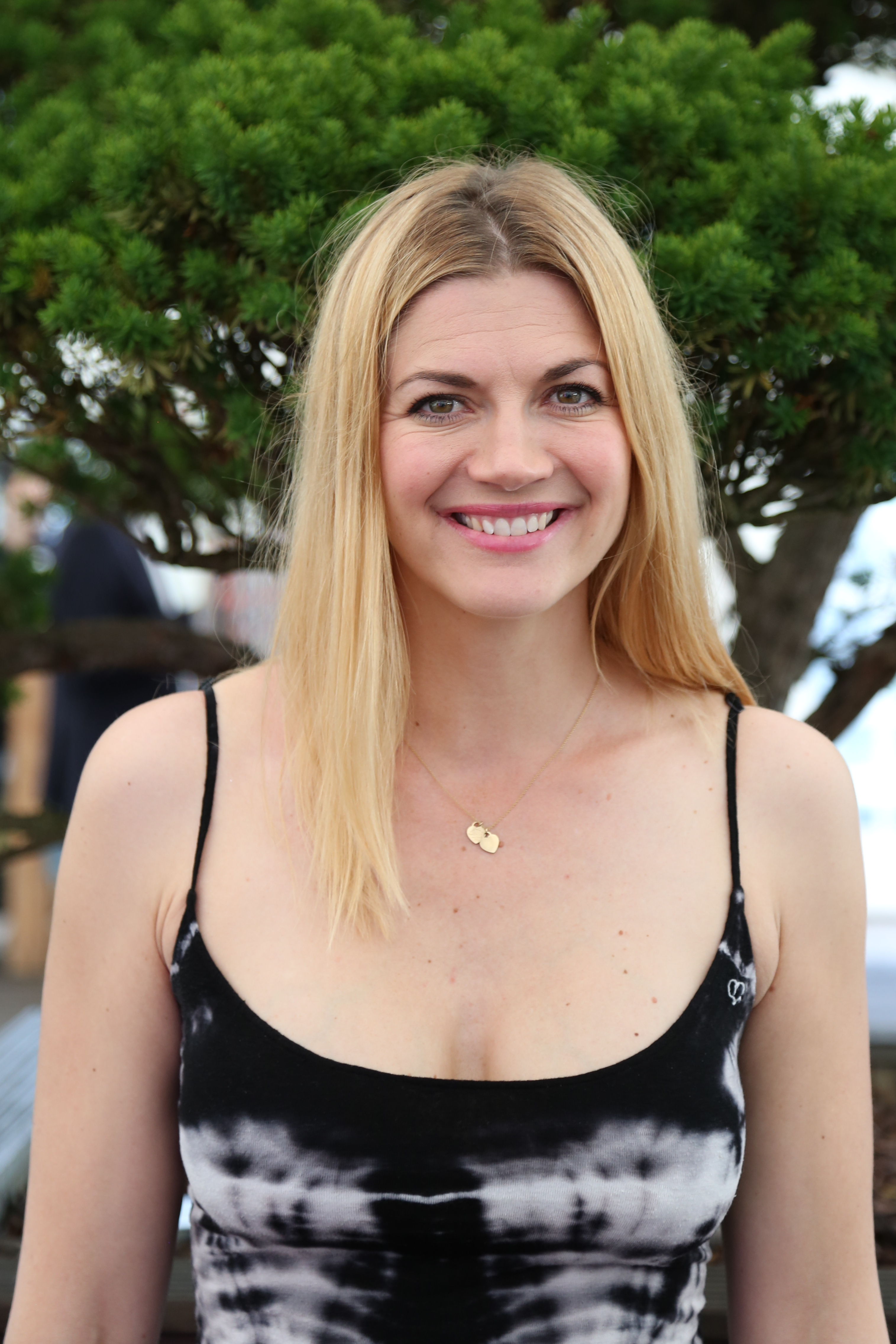 Nina Bott bei der Aspria-Sommerparty 2017 am 17. Juni in Hamburg.